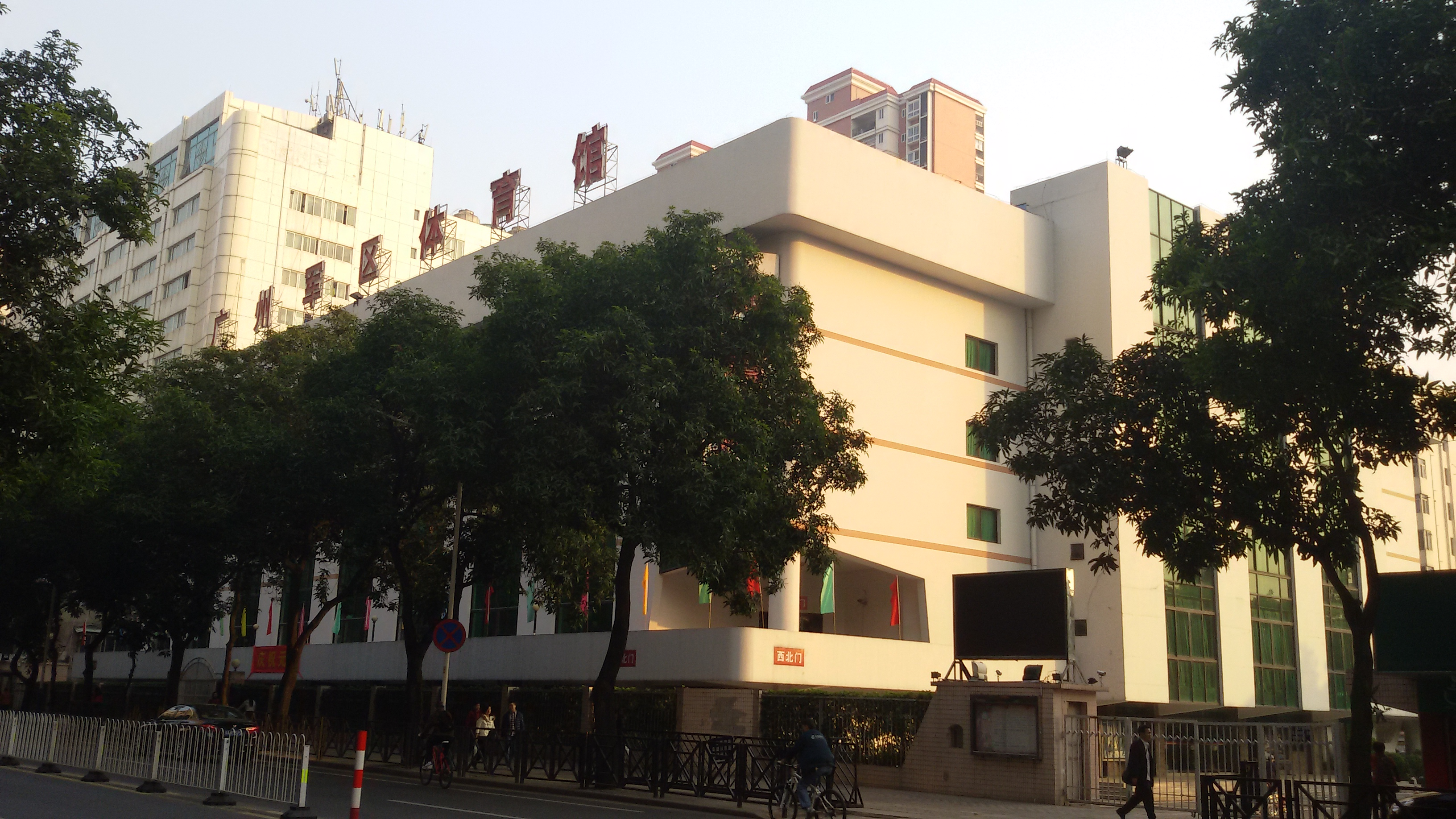 粵語: 廣州軍區體育館